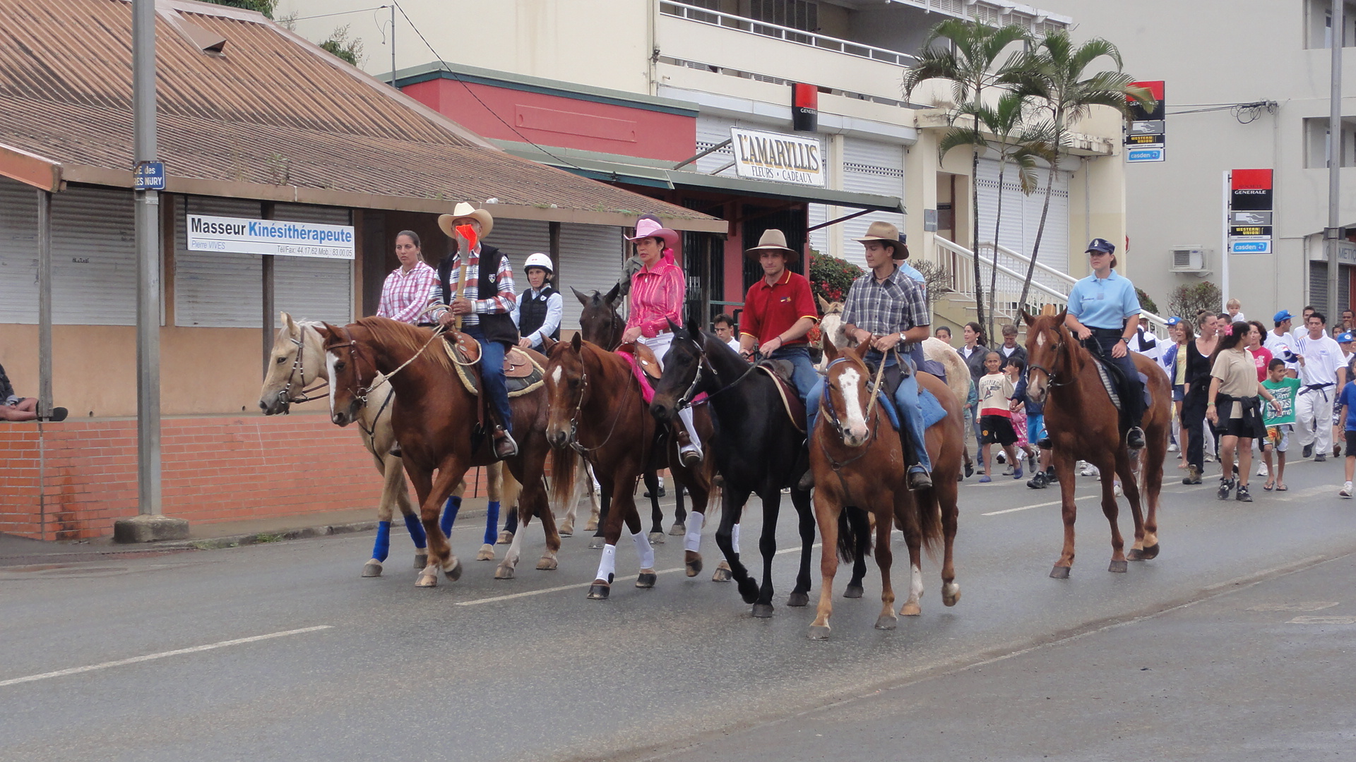 Arrivée de la Flamme des jeux